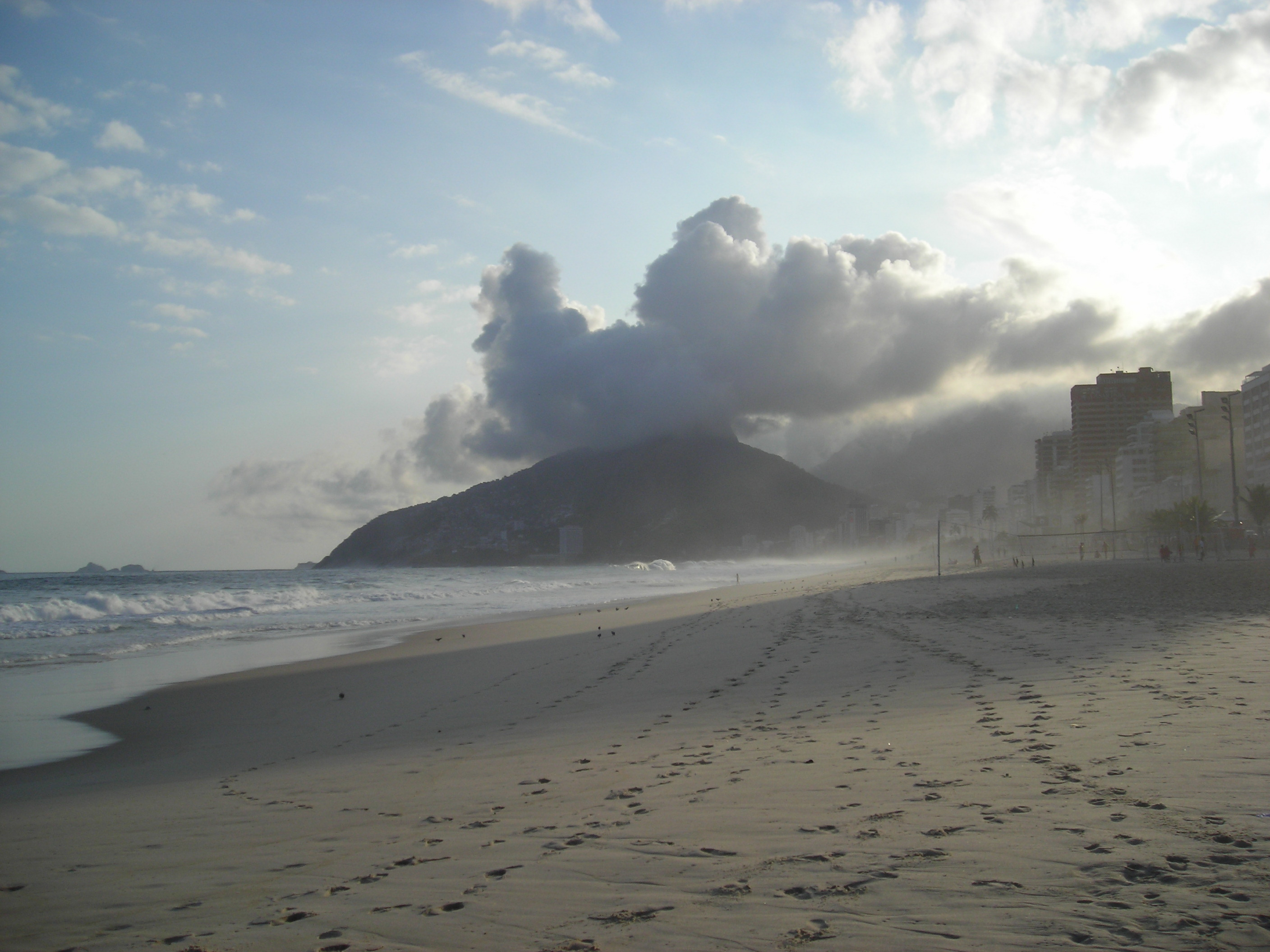 plage d'Ipanema, vu vers les deux frêres nuages